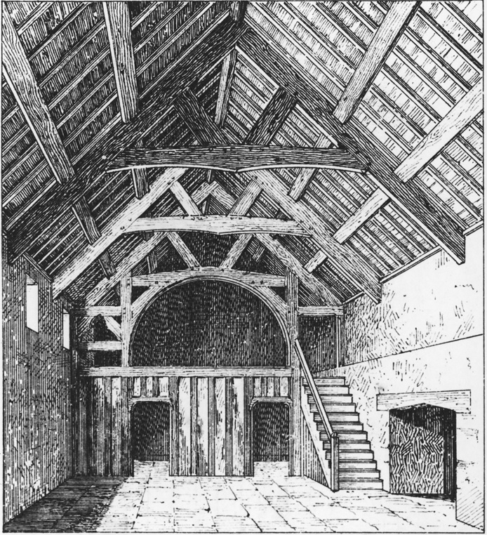 Llun Mewnol Pensaer yn 1875 o Gwrt Plas yn Dre